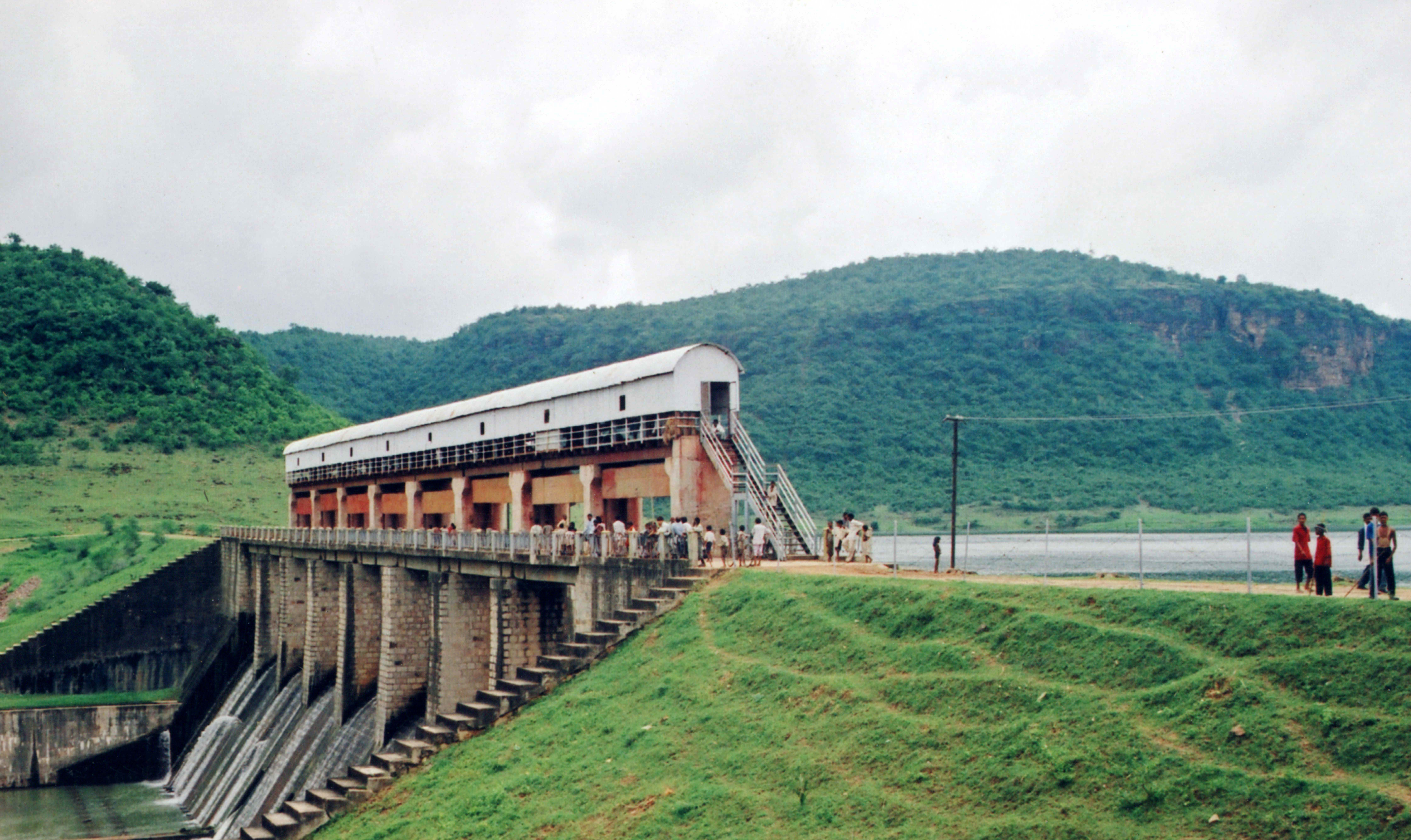 Kohira dam in Kaimur district, Bihar, India